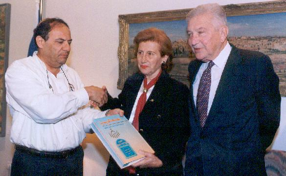 פרופסור דב גולדברגר מעניק לנשיא ויצמן ואשתו כרך של ההפעלופדיה בשפה הערבית